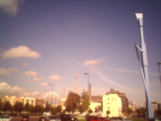 Parotet diurno